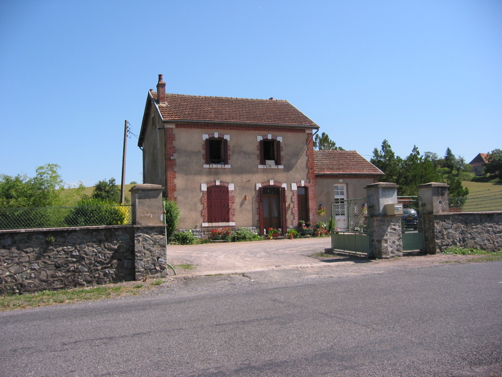 Jaligny-sur-Besbre (Allier, France) - Ancienne gare de chemin de fer.